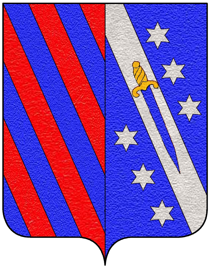 Stemma della famiglia Sorgo Cerva